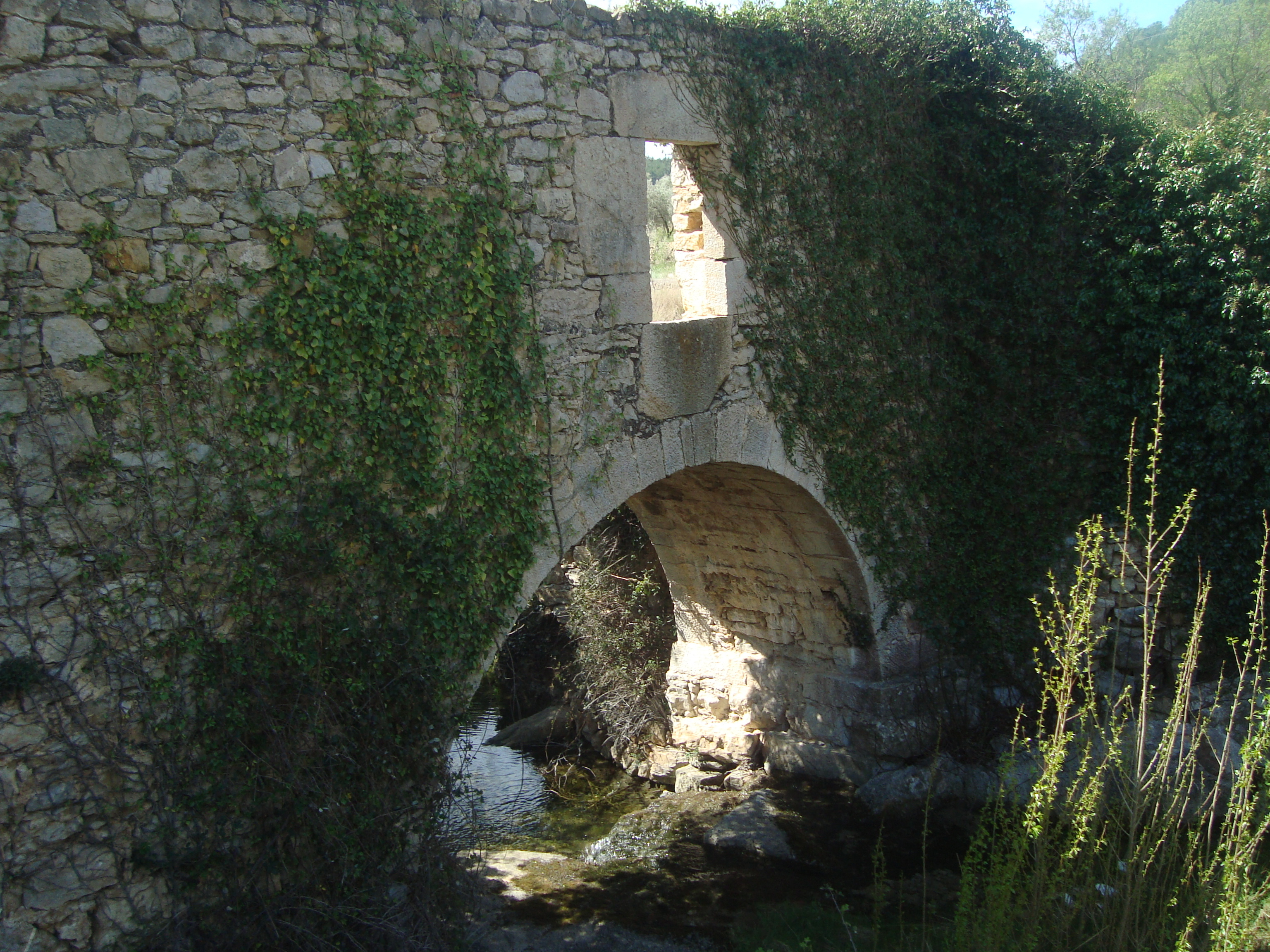 Puente medieval sobre el barranco del Molinar (Xert, Castellón)